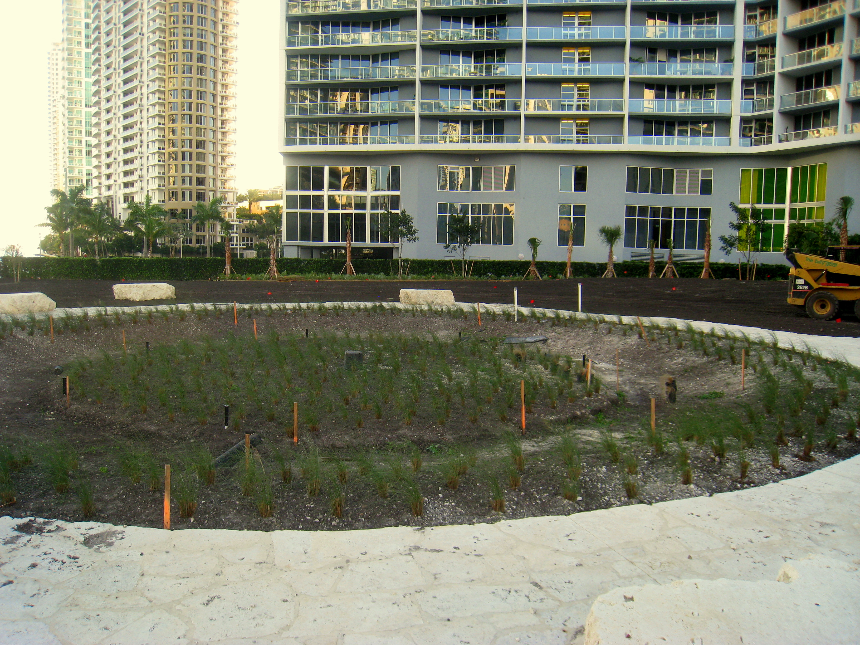 Miami Circle, Miami, Florida, USA.